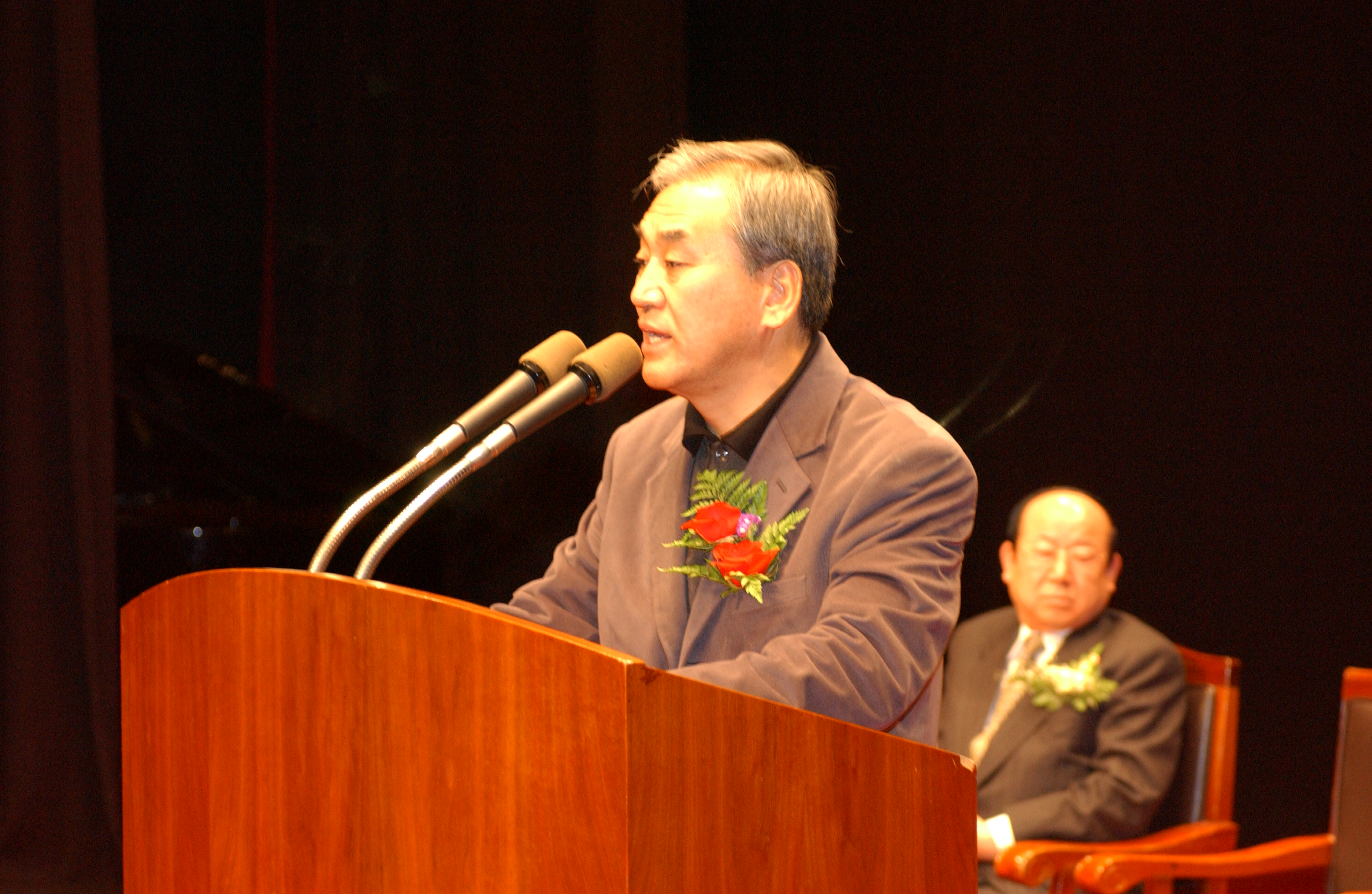 이재오, 2003년 3월 소방청 개청 관련 공청회 (세종문화회관)